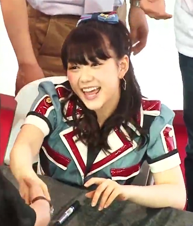 中文（香港）: HKT48 Fans Meeting 2015-05-12 @ 西九龍中心